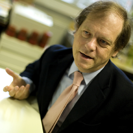 Rik Torfs - Portrait